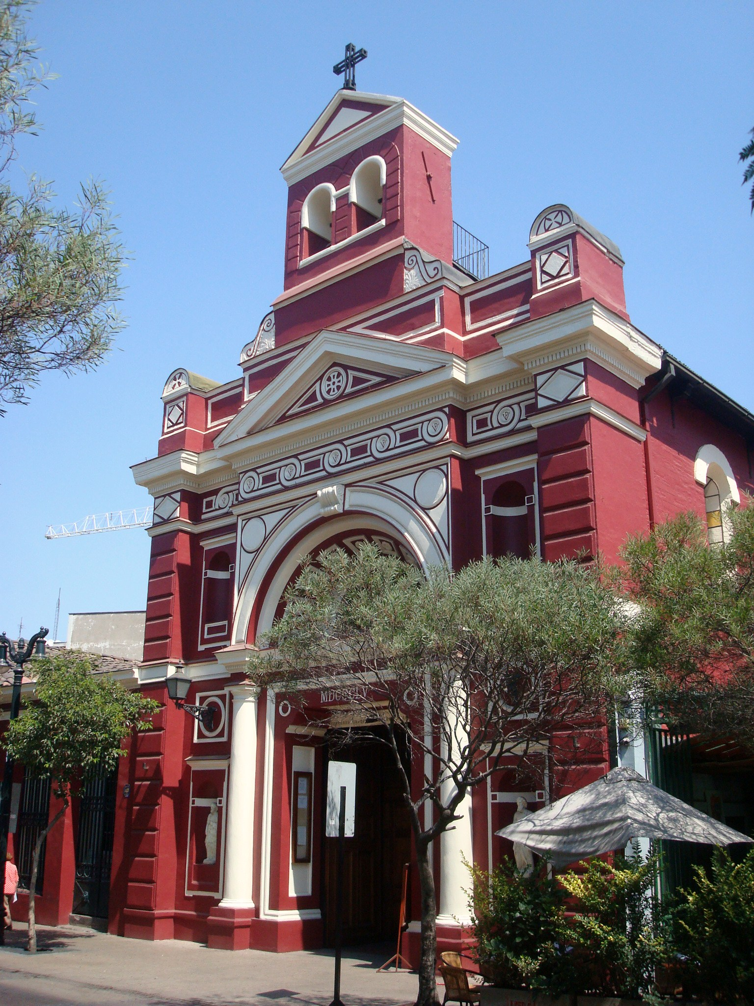 Iglesia de la Vera Cruz, Barrio Lastarria, Santiago Centro, Chile